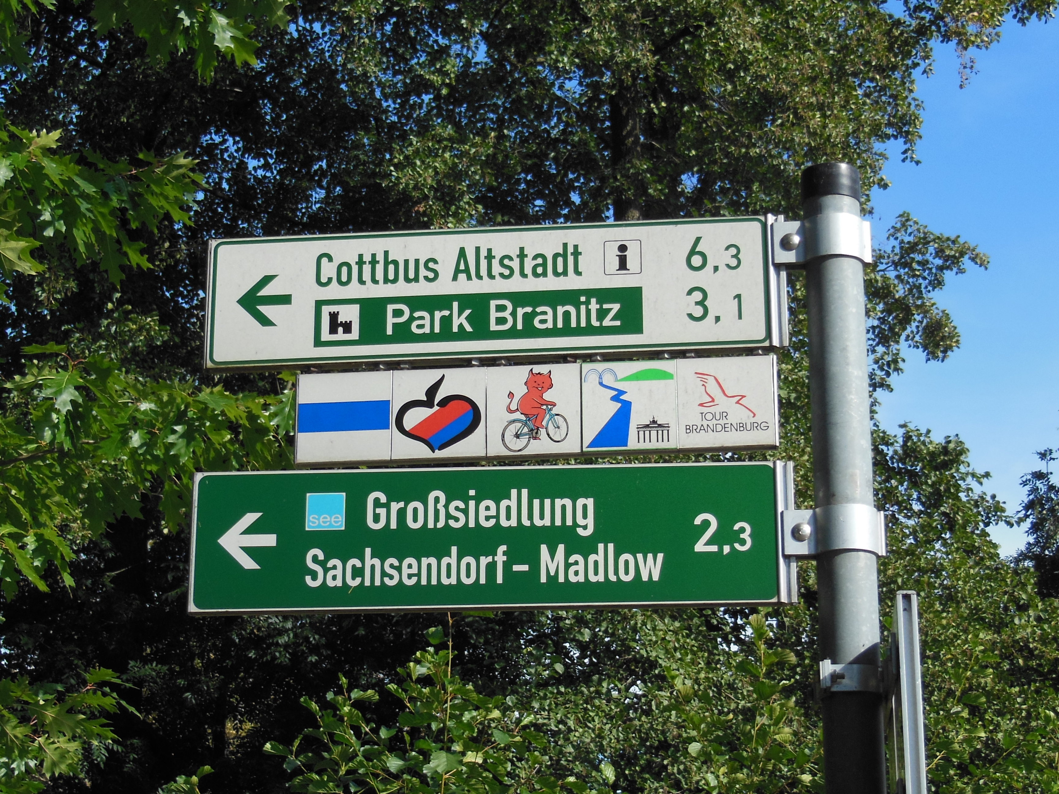 Wegweiser für Fahrradfahrer in Cottbus